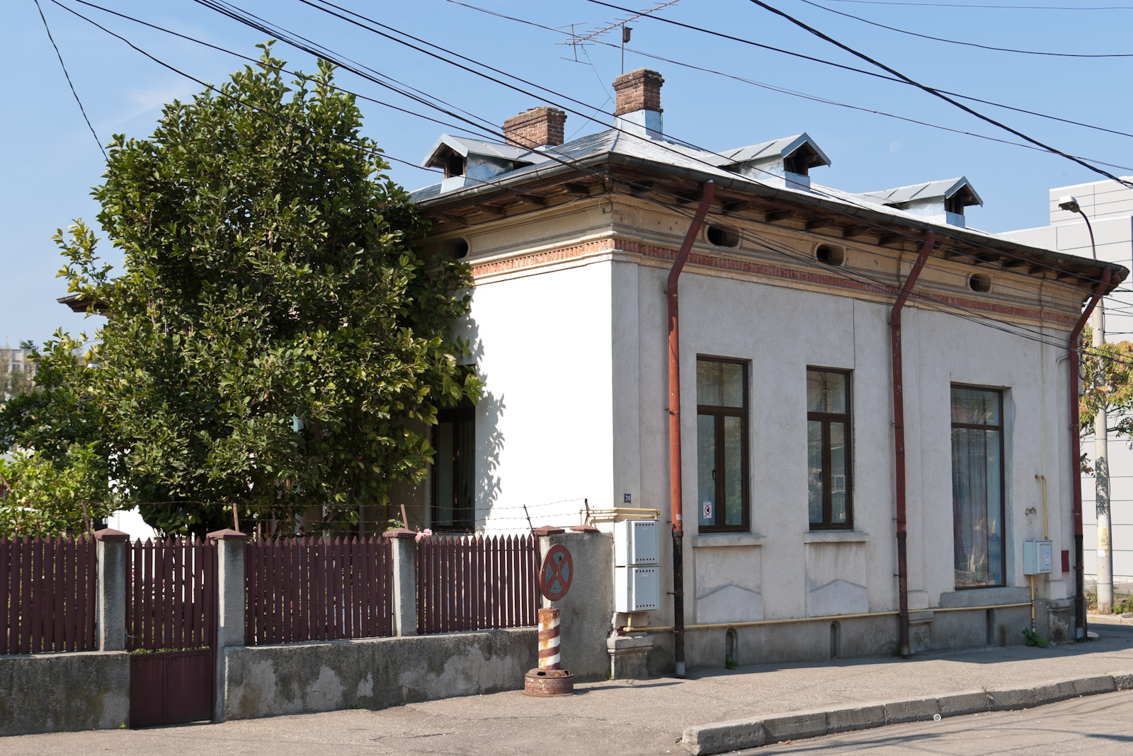 Fotografia prezinta casa de pe str. Victorie nr. 39, vazuta dinspre NE.